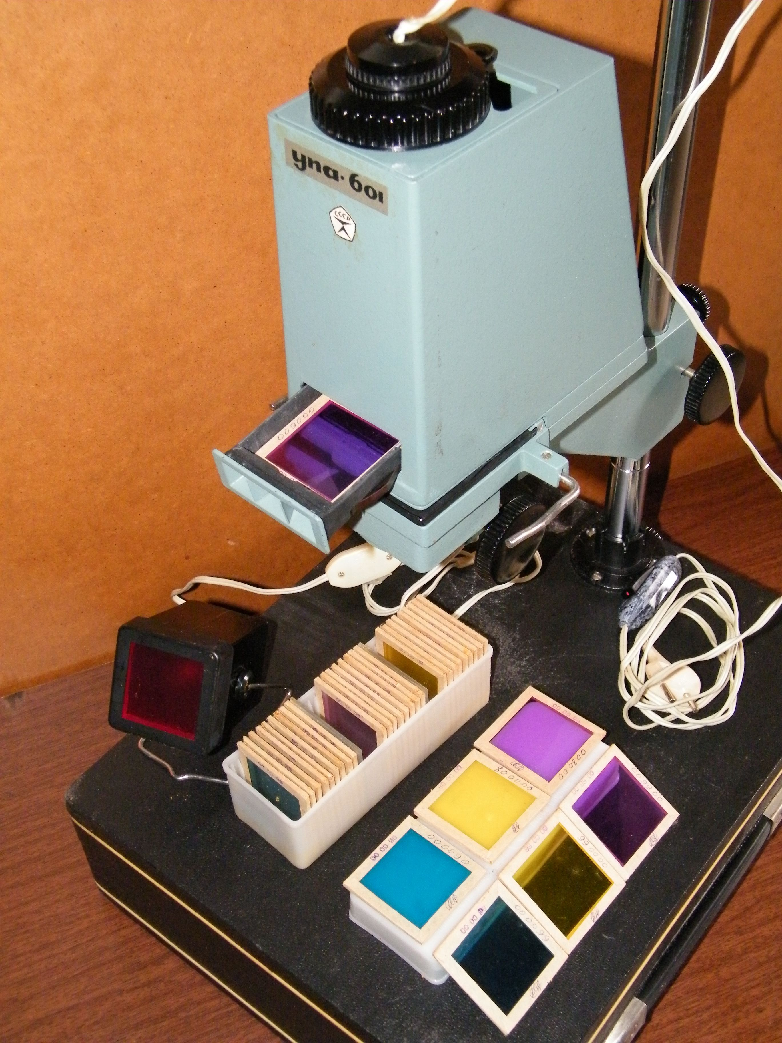 Фотоувеличитель "УПА-601" и корректирующие светофильтры для субтрактивной печати. СССР, 1981 год.